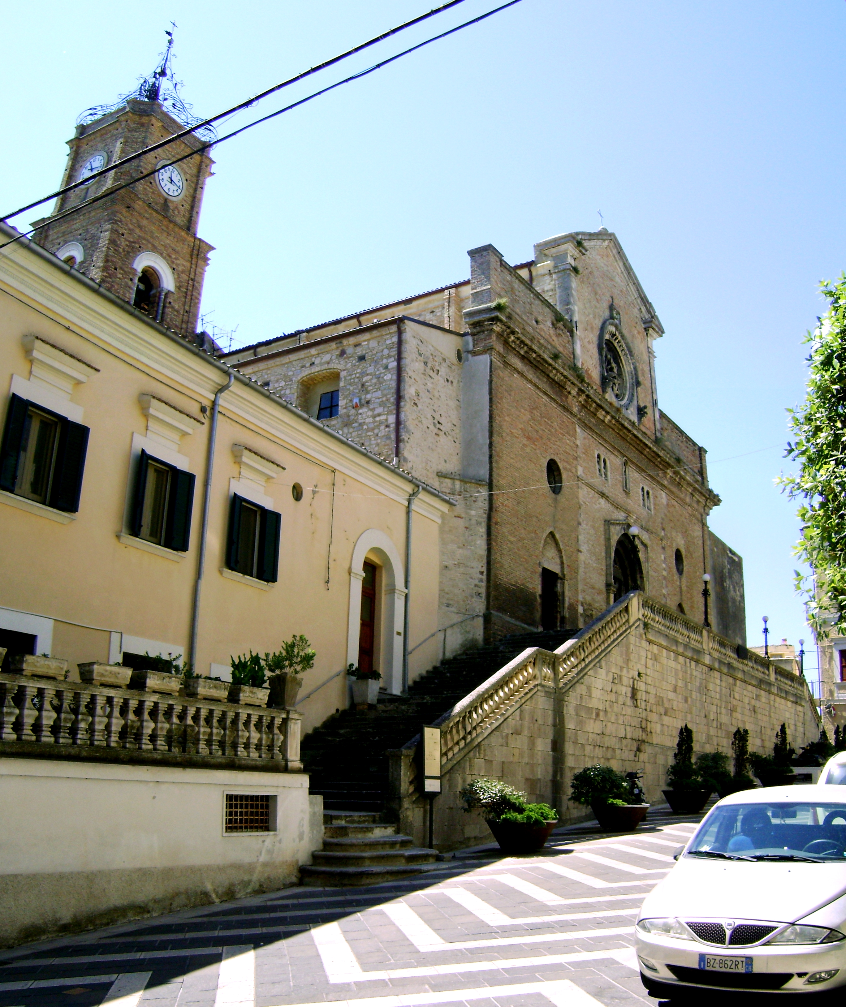 Duomo di San Leucio, Atessa, Chieti.